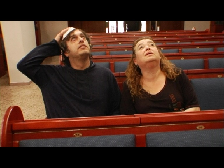 מתוך הסרט התיעודי "אלוהים ואני", בבימויו של נתי אדלר